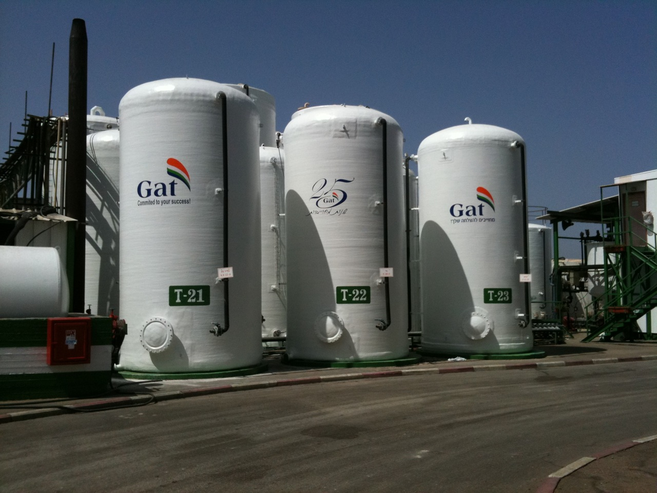 מפעל דשן גת באלון תבור בחגיגות 25 שנה לחברה